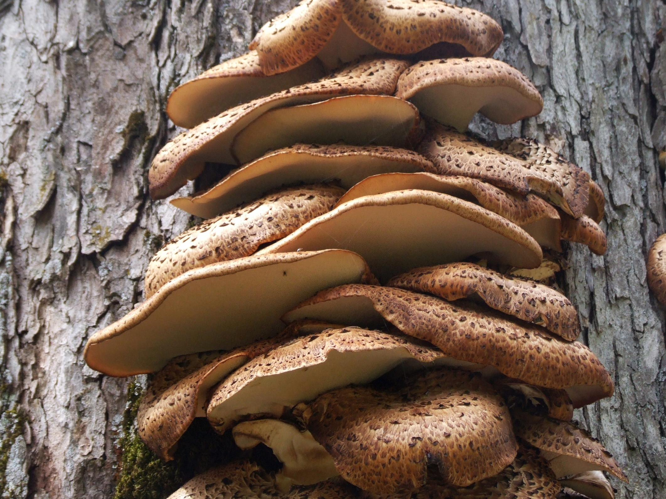 Polyporus squamosus